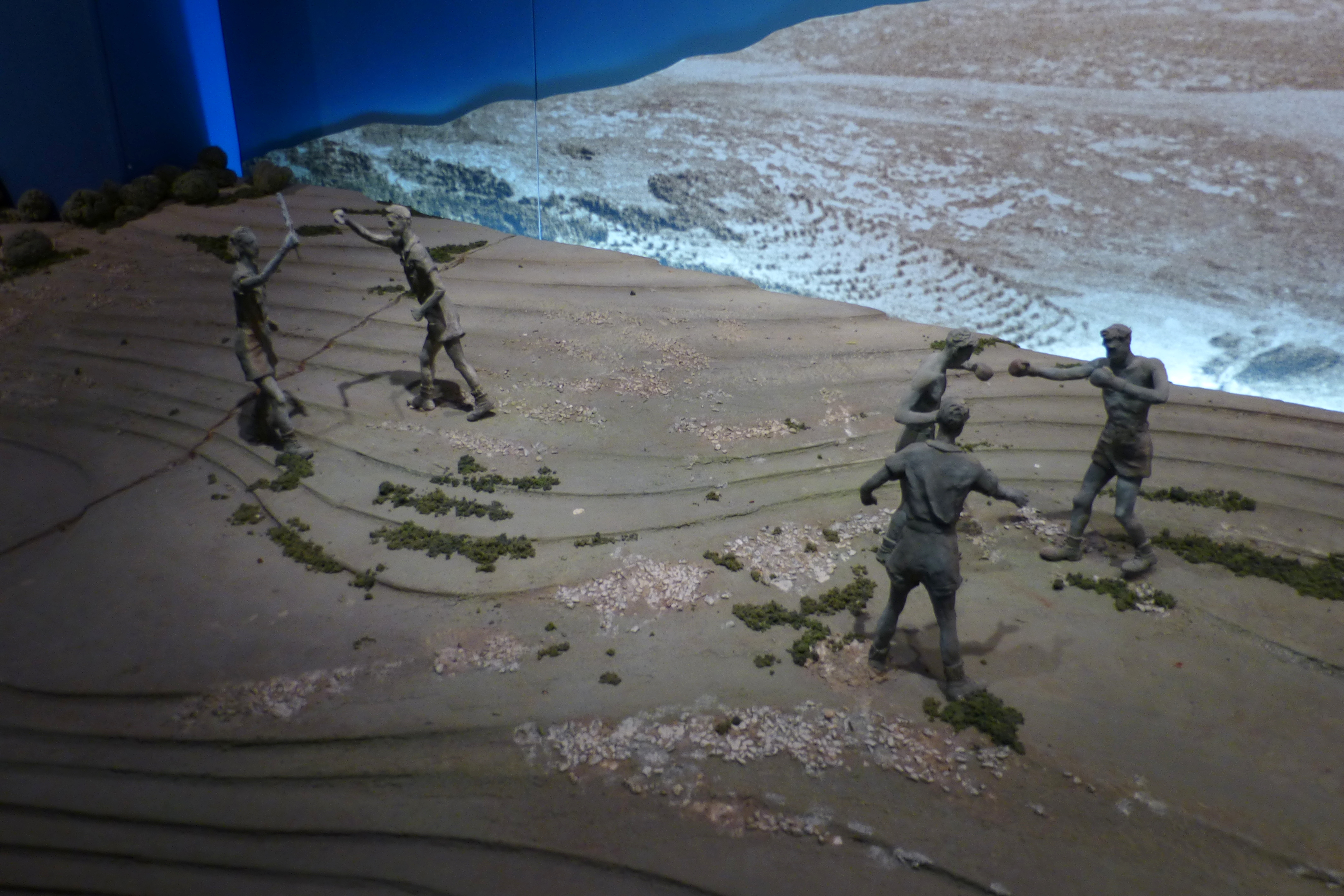 ג'וערה הוא בסיס גדנ"ע ומוזיאון הנמצאים על גבעה ברמות מנשה, במיקום היסטורי ששימש בעבר כבסיס ההדרכה המרכזי למפקדים של ארגון "ההגנה". שמה העברי של הגבעה הוא "גבעת נֹח".